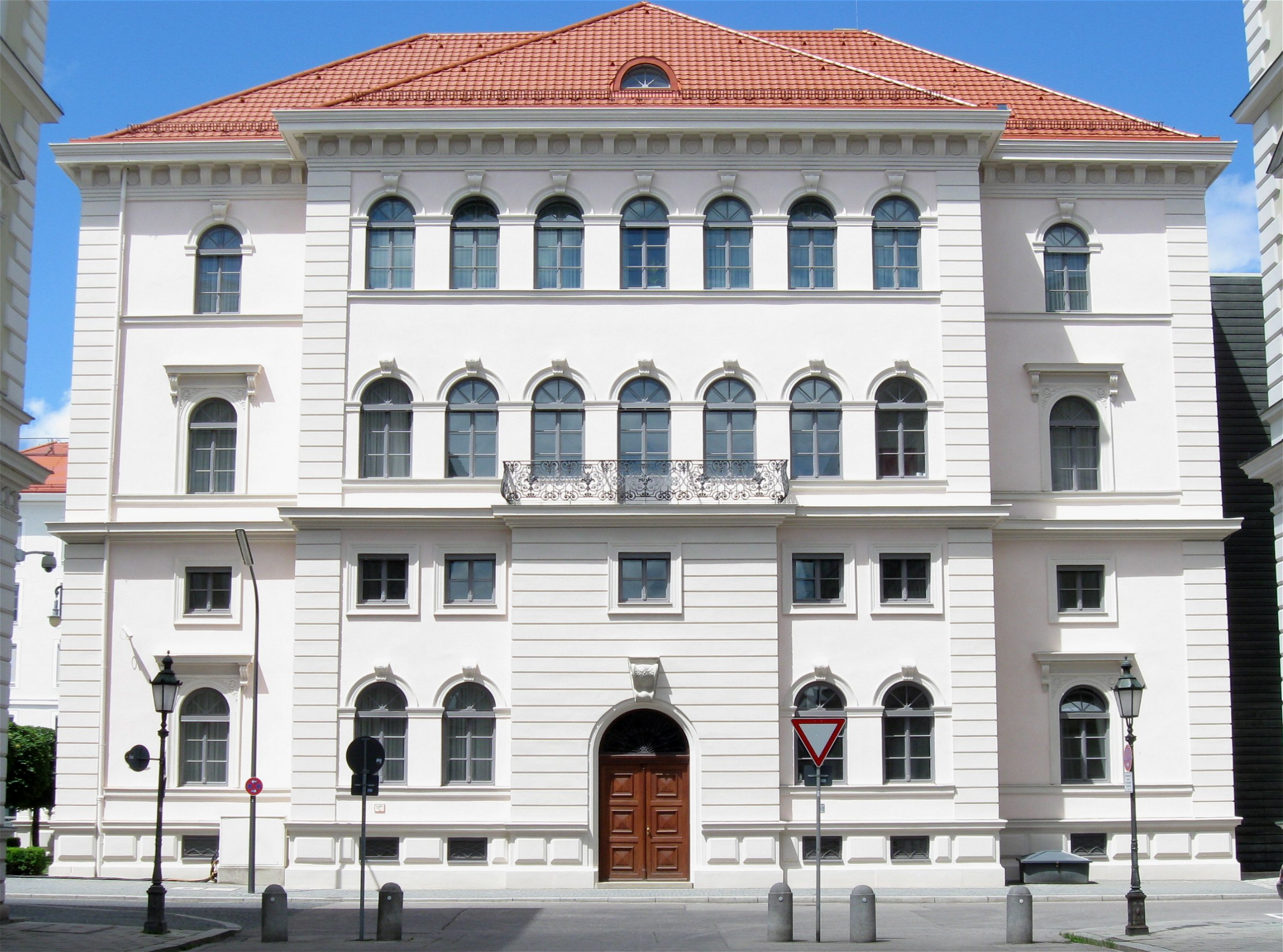 Palais Ludwig Ferdinand, Wittelsbacherplatz, München, erbaut von Leo von Klenze, zentrale Verwaltung der Siemens AG, 2008 Fassade renoviert